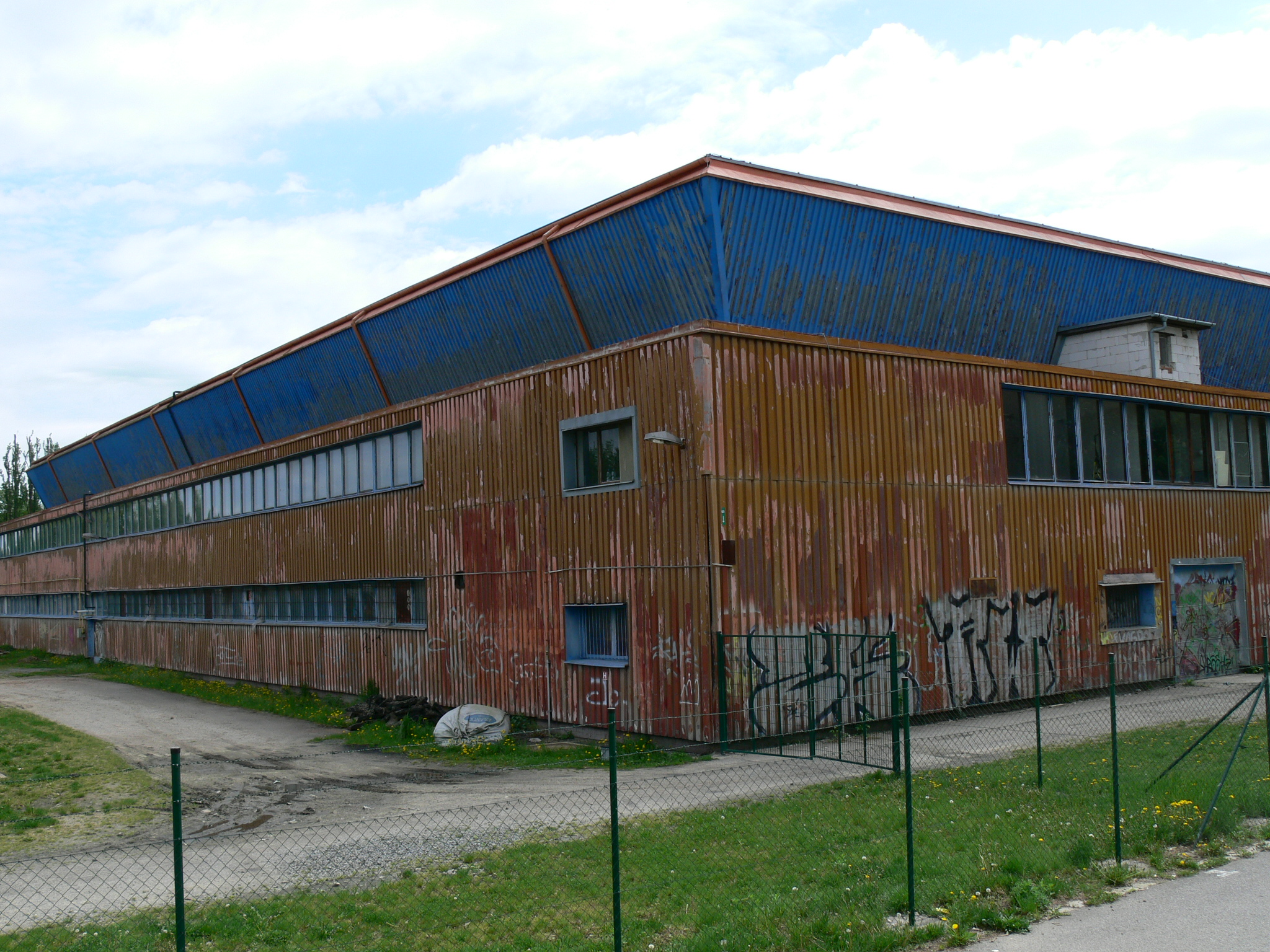 Dědice, sportovní areál, zimní stadion